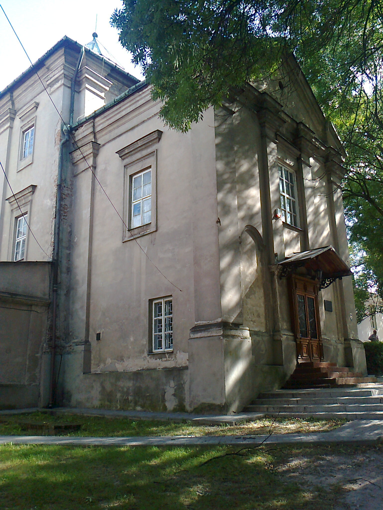 Dawna cerkiew św. Mikołaja, część kompleksu zabudowań unickiego seminarium duchownego w Chełmie